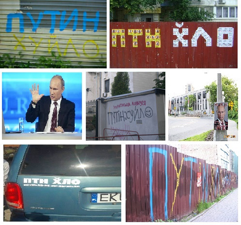 Колаж мему. Верхній ряд: приклад вживання гасла у Луганську, Напис «ПТН ХЛО», викладений наліпками кампанії «Не купуй російське!» на паркані у Броварах; По середині: Володимир Путін, «Путін хуйло» на паркані Посольства Росії в Києві, Напис «HUYLO» біля посольства РФ в Канаді (Оттава); Нижній ряд: «Путін хуйло» на автомобілі в Польщі, Напис «Путін хуйло ла-ла-ла-ла-ла-ла-ла-ла» на паркані у Києві